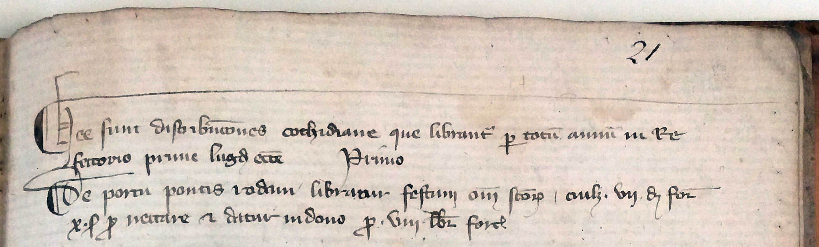 Deux premières phrases en haut du folio 21 écrit en latin. La première phrase dit : "Hec sunt distributiones cothidiane que librantur per totum annum in refectorio prime Lugdunensis ecclesie"